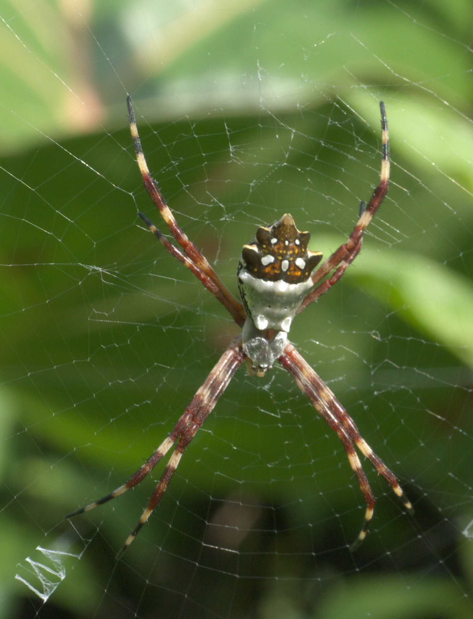 Argiope argentata, silver argiope, ID Confidence: 96